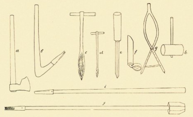 Беларуская (тарашкевіца): Асноўныя бортныя прылады